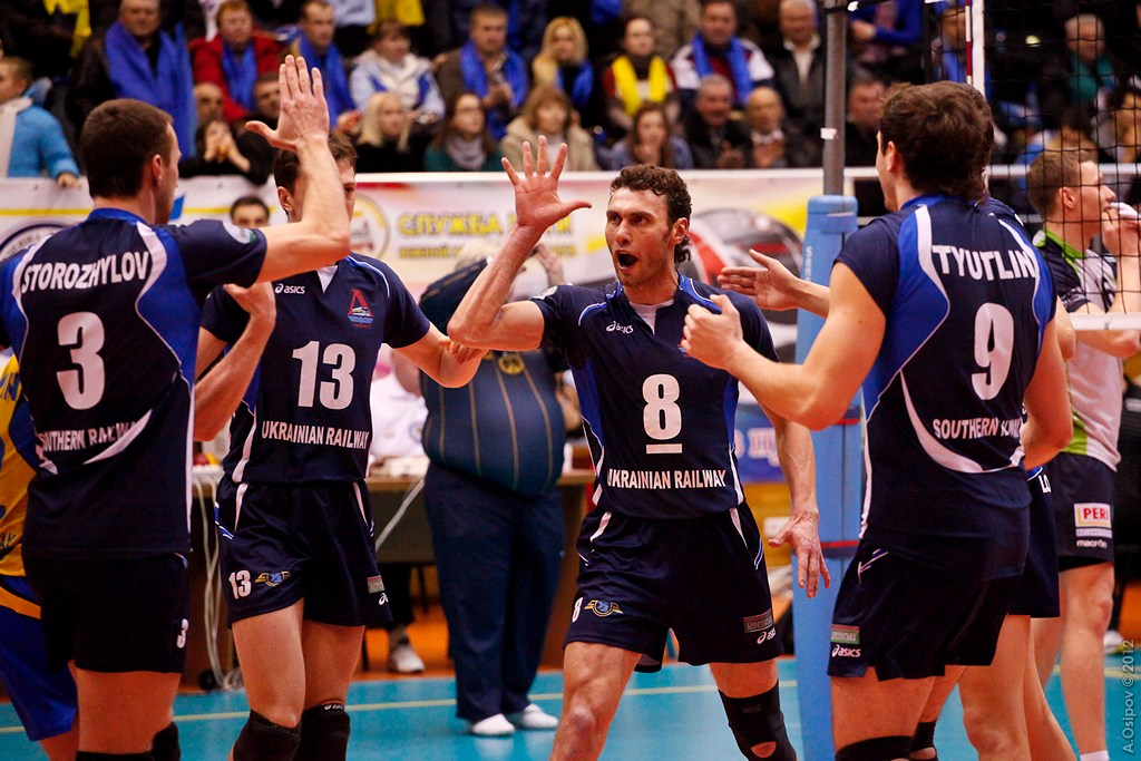 ВК Локомотив Харьков - Политехника Варшава